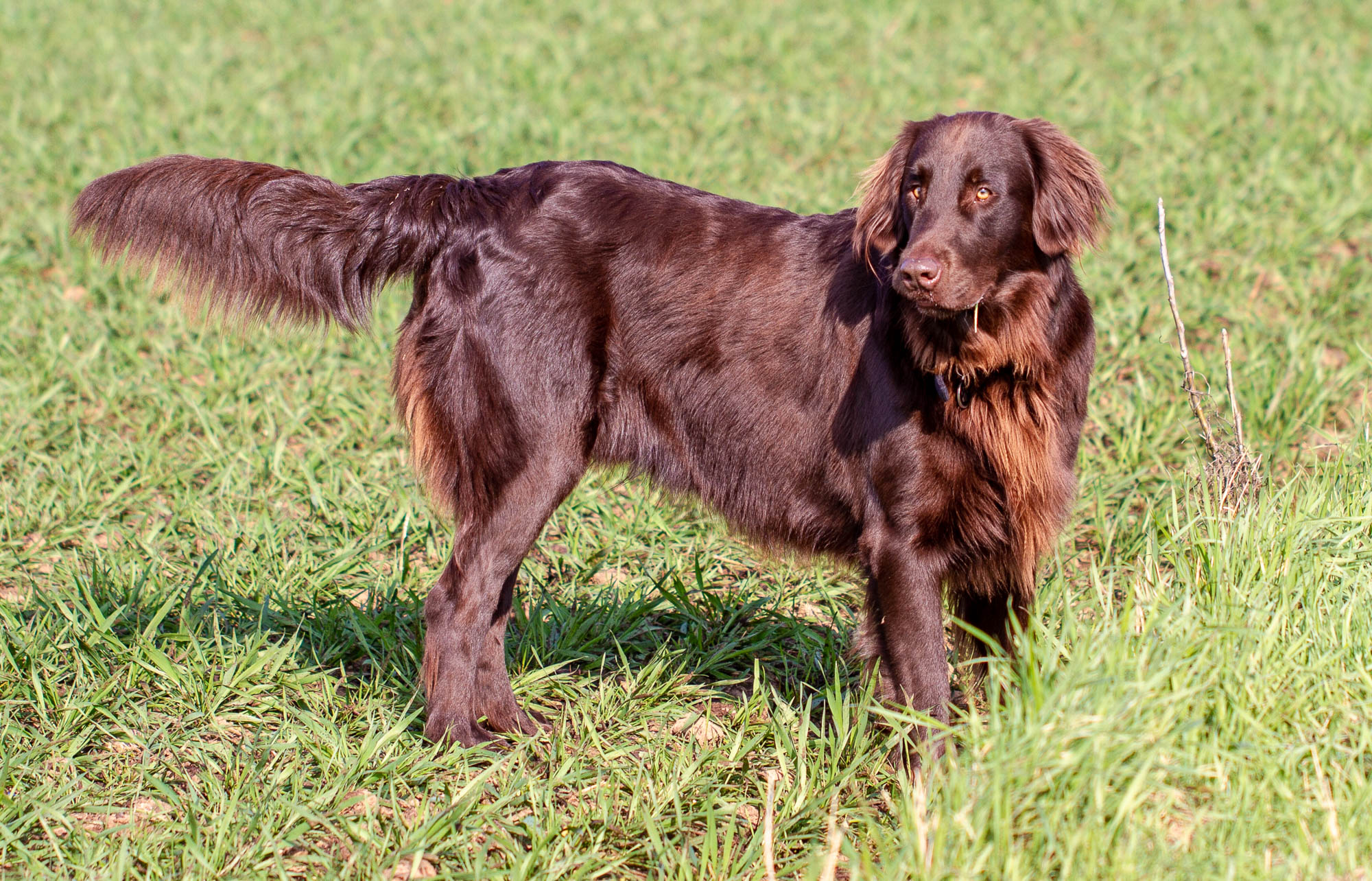 Ein leberfarbener Flat Coated Retriever